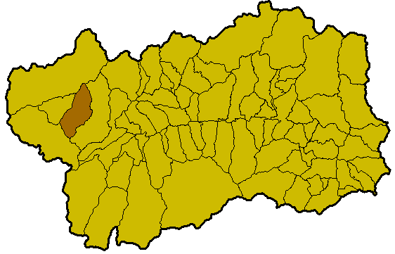 Morgex